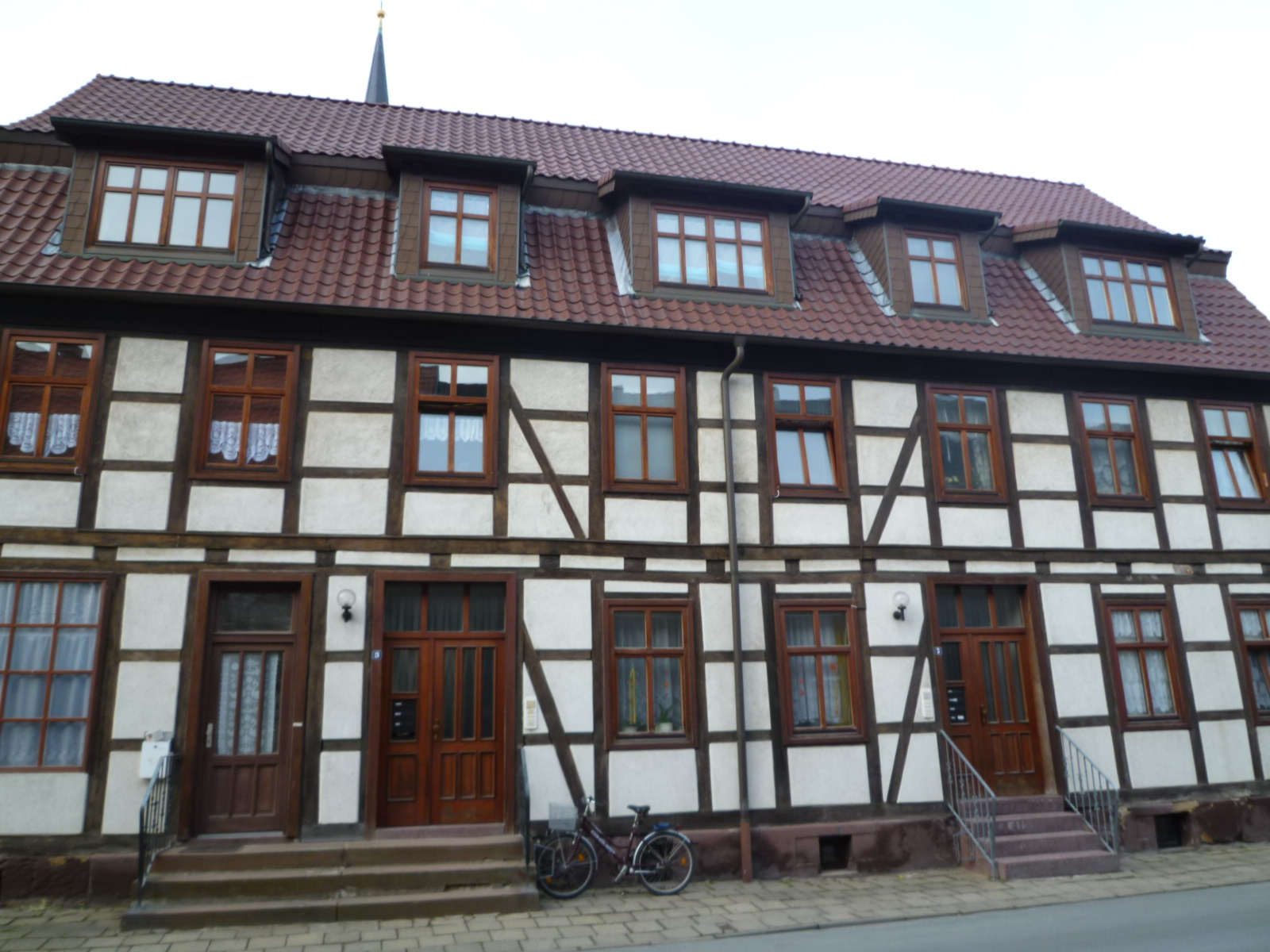 Wohnhaus in Calvörde, Neustadtstraße 3, Vorderansicht